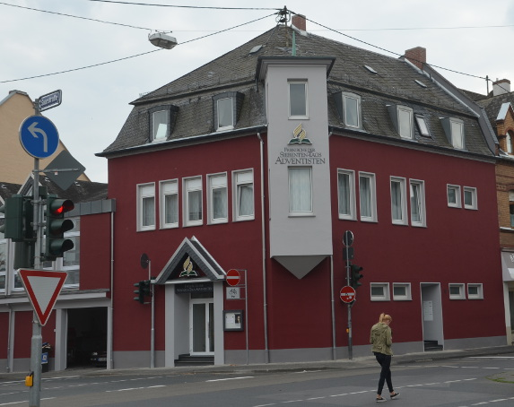 Gebäude der Adventgemeinde Wiesbaden an der Ecke Rheingaustraße/Wasserrolle